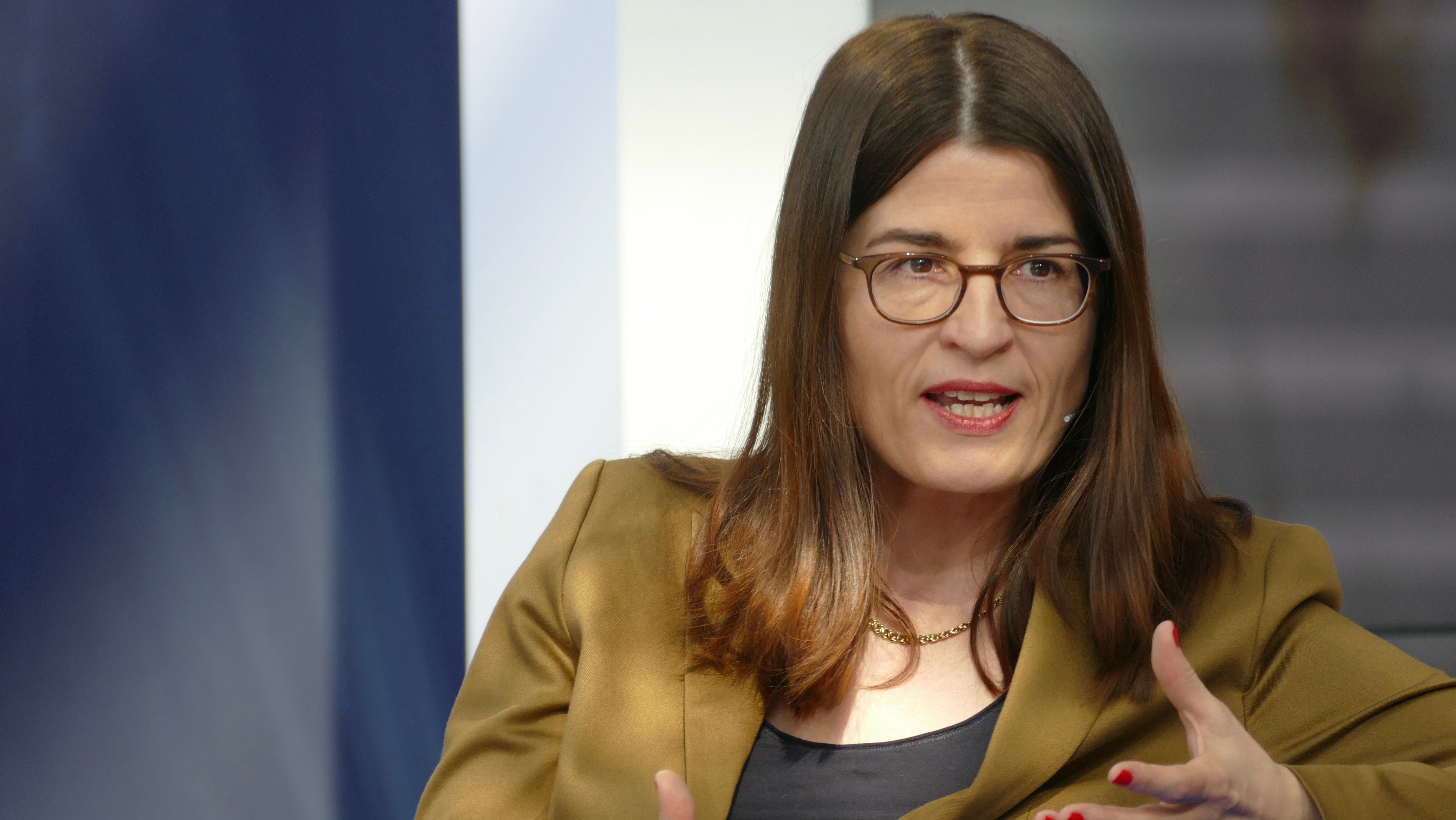 Kia Vahland stellt auf auf der Leipziger Buchmesse 2019 ihr Sachbuch "Leonardo da Vinci und die Frauen. Eine Künstlerbiographie" (Insel Verlag) vor.